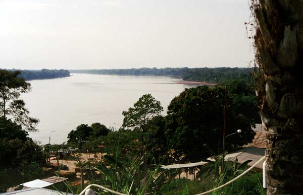 Puerto Maldonado am Rio Madre de Dios (peruanische Selva)